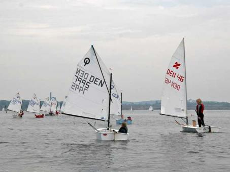 Zoom 8 dinghy (right) and optimists Ydernæs, Denmark